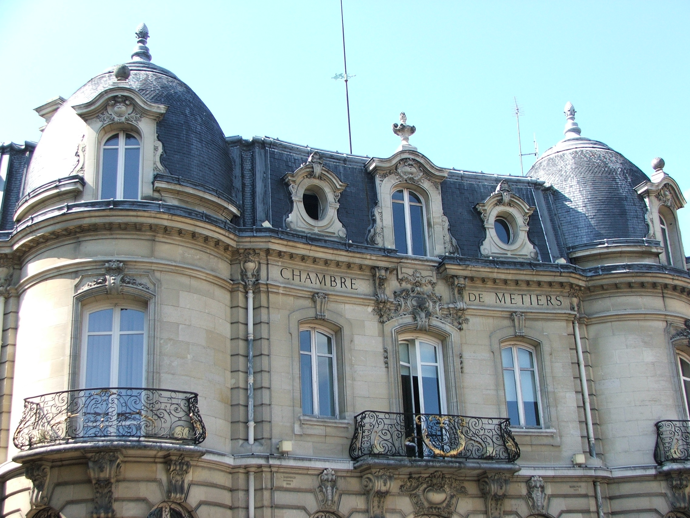 La chambre des métiers du Mans datant de 1906.